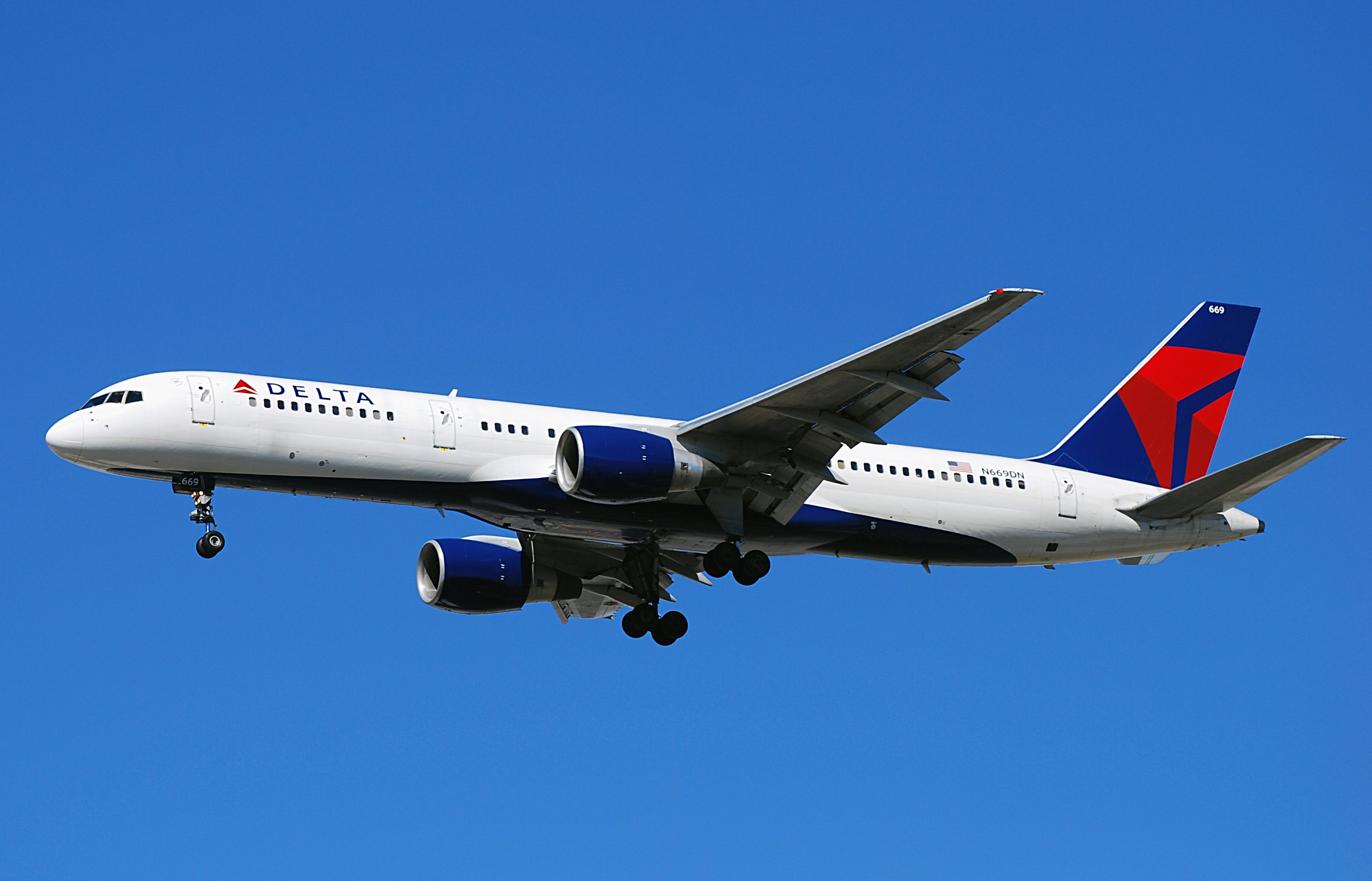 Las Vegas - McCarran International (LAS / KLAS) USA - Nevada, 10-12-2010 Photo: Tomás Del Coro